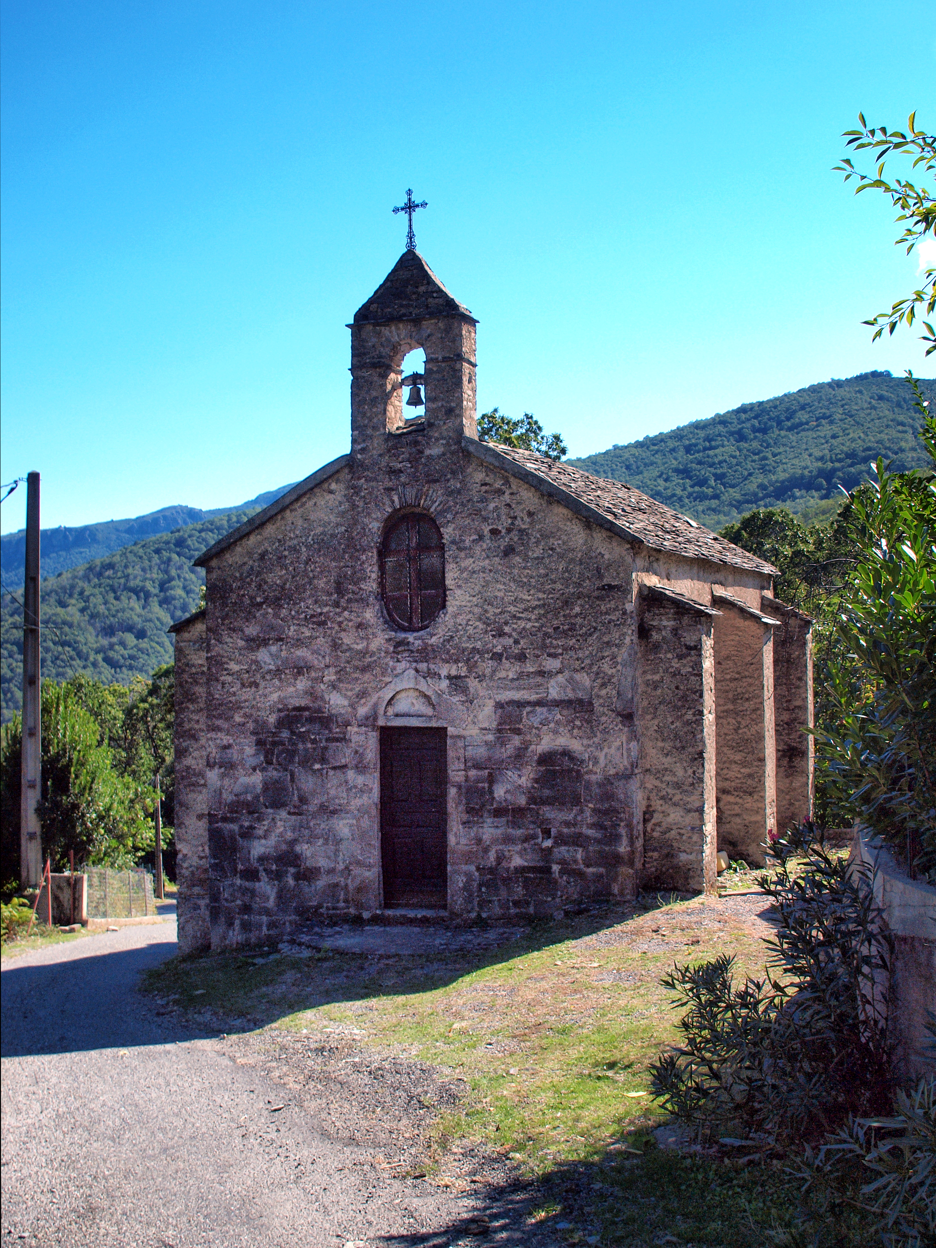 Ortiporio, Castagniccia (Corse) - Chapelle Saint-Michel